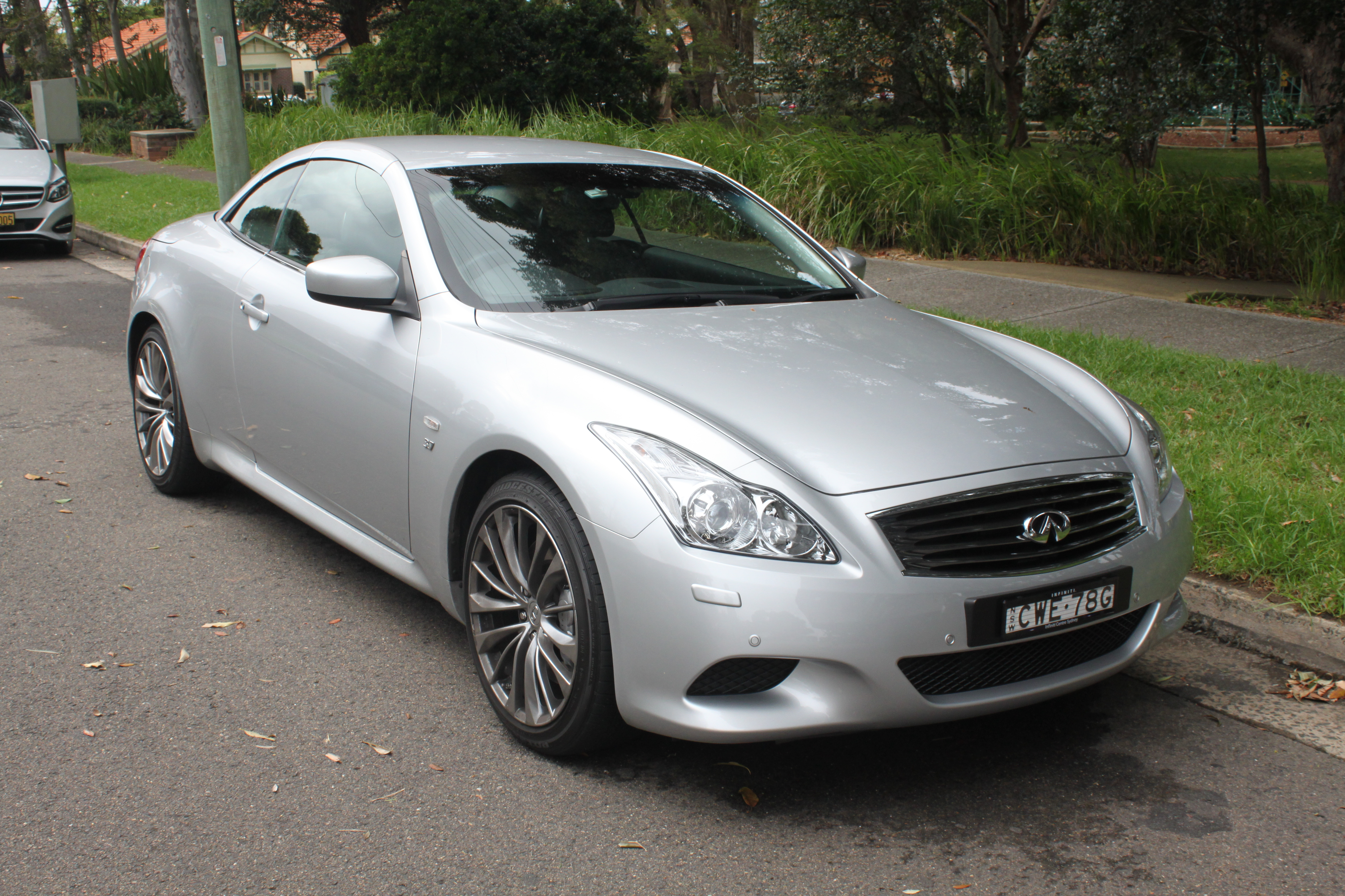 Infiniti Q60 V36 S Premium